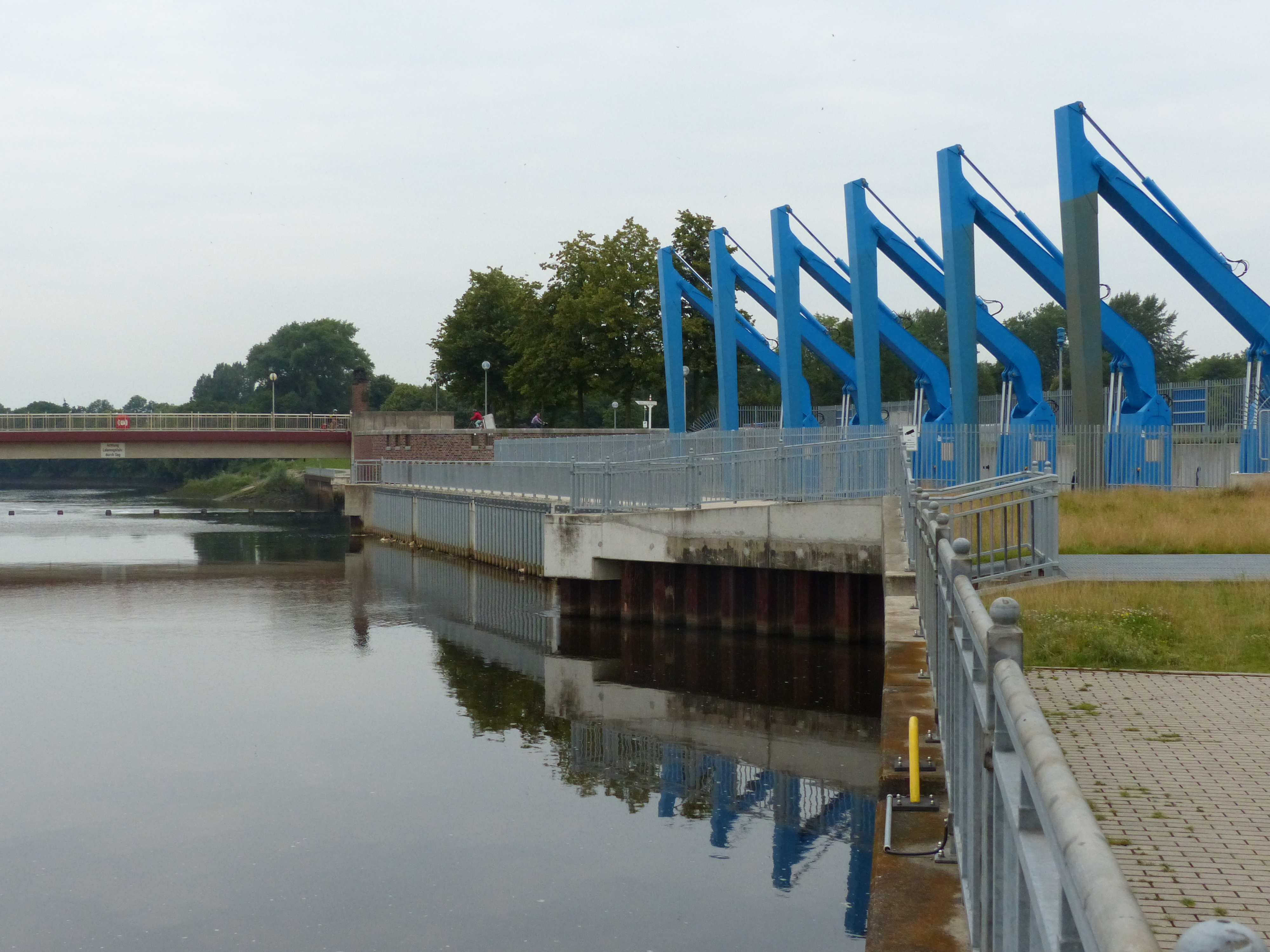 Weserkraftwerk vom Oberwasser: Vor der Spundwand zweigt der Fischpass von der Weser ab, hinter der Spundwand das Triebwasser